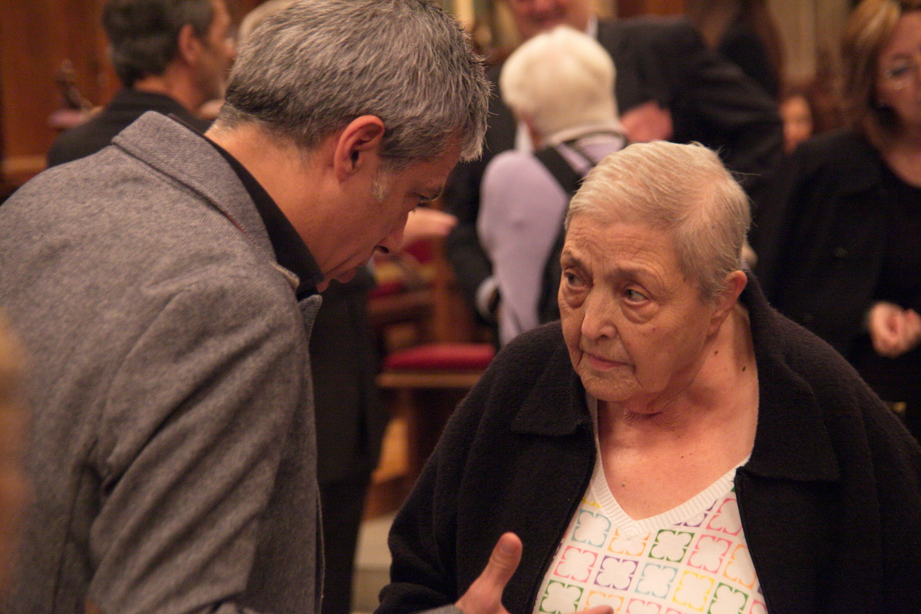 Albert Om i Nuria Gispert a l'Acte de lliurament a Neus Català de la medalla d'Or al Mèrit Cívic de l'Ajuntament de Barcelona. 29-10-2014